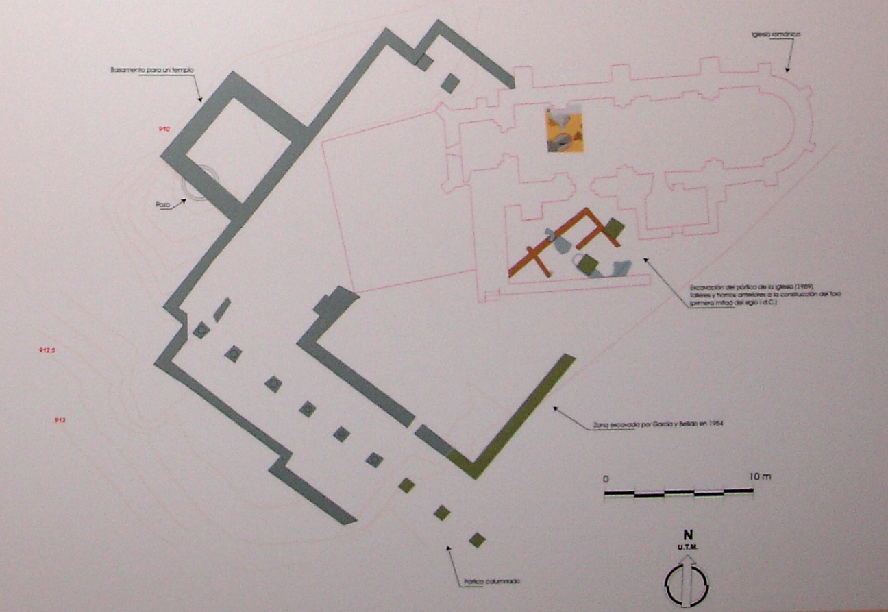 Planta del foro romano de la ciudad de Julióbriga. En la imagen se observa la planta de la iglesia románica de Santa María de Retortillo.